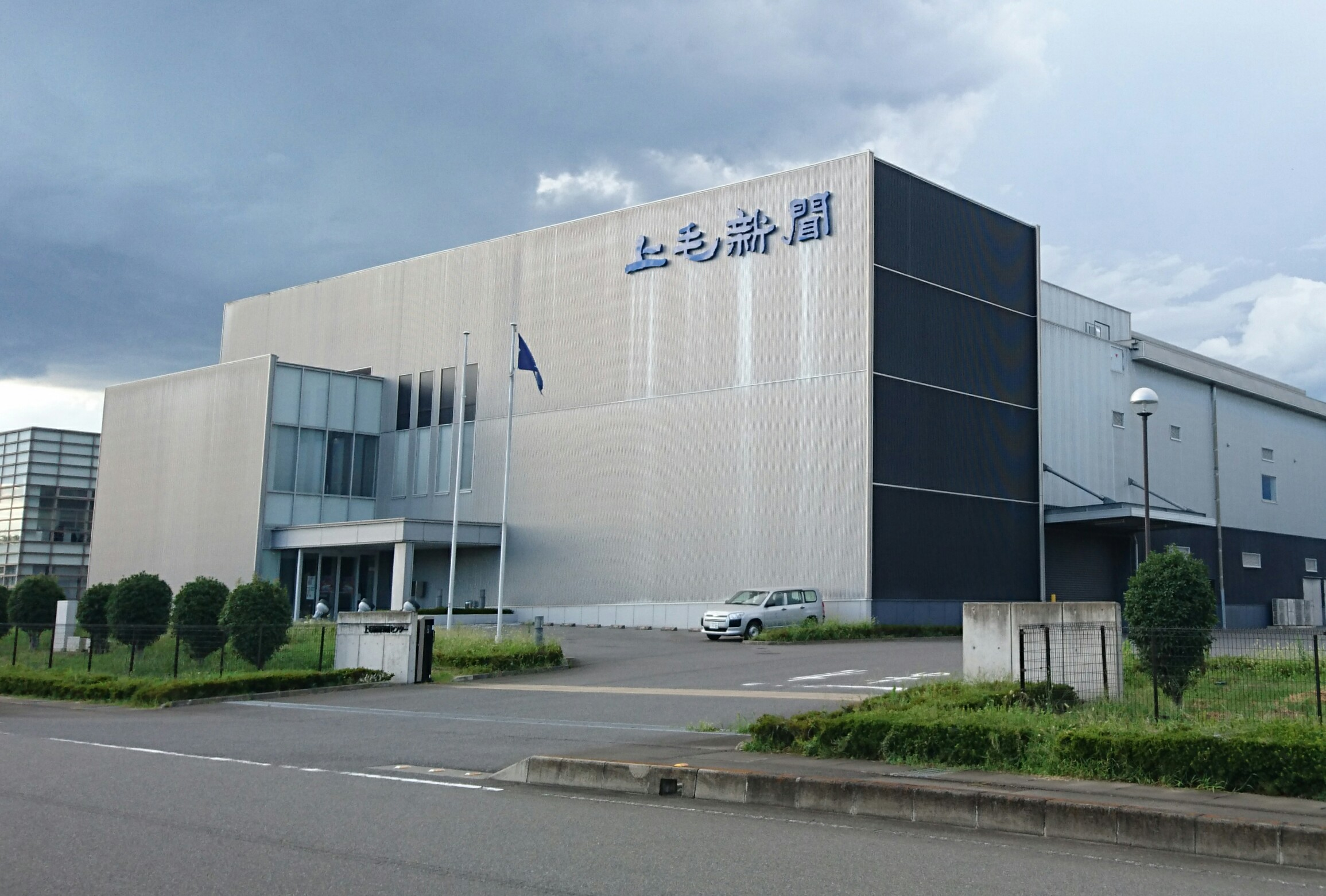 上毛新聞印刷センター